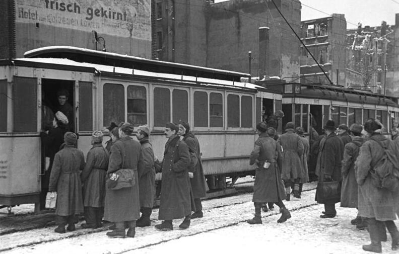 ADN-ZB/Donath Berlin Heimkehrer aus sowjetischer Kriegsgefangenschaft die in der Mühlenstraße die Straßenbahn der Linie 4 zur Weiterfahrt benutzen. Aufn. März 1948